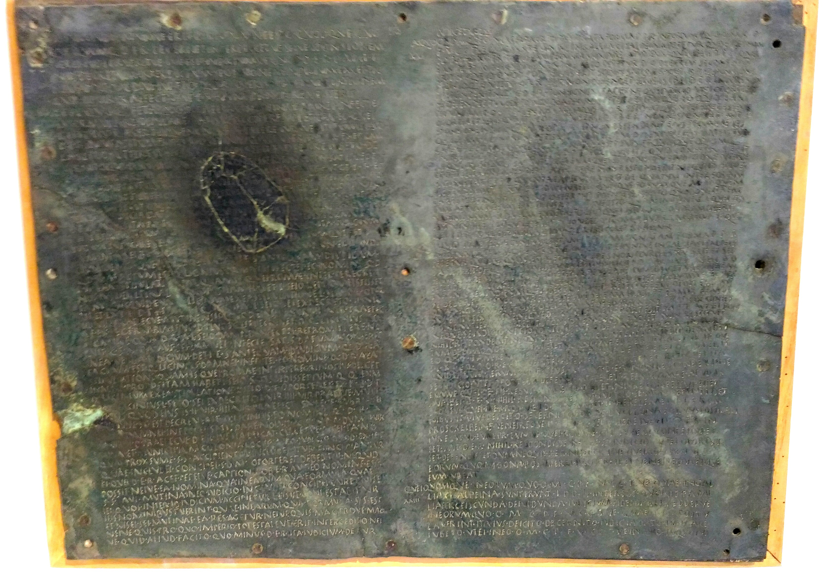 Lex Rubria de Gallia Cisalpina